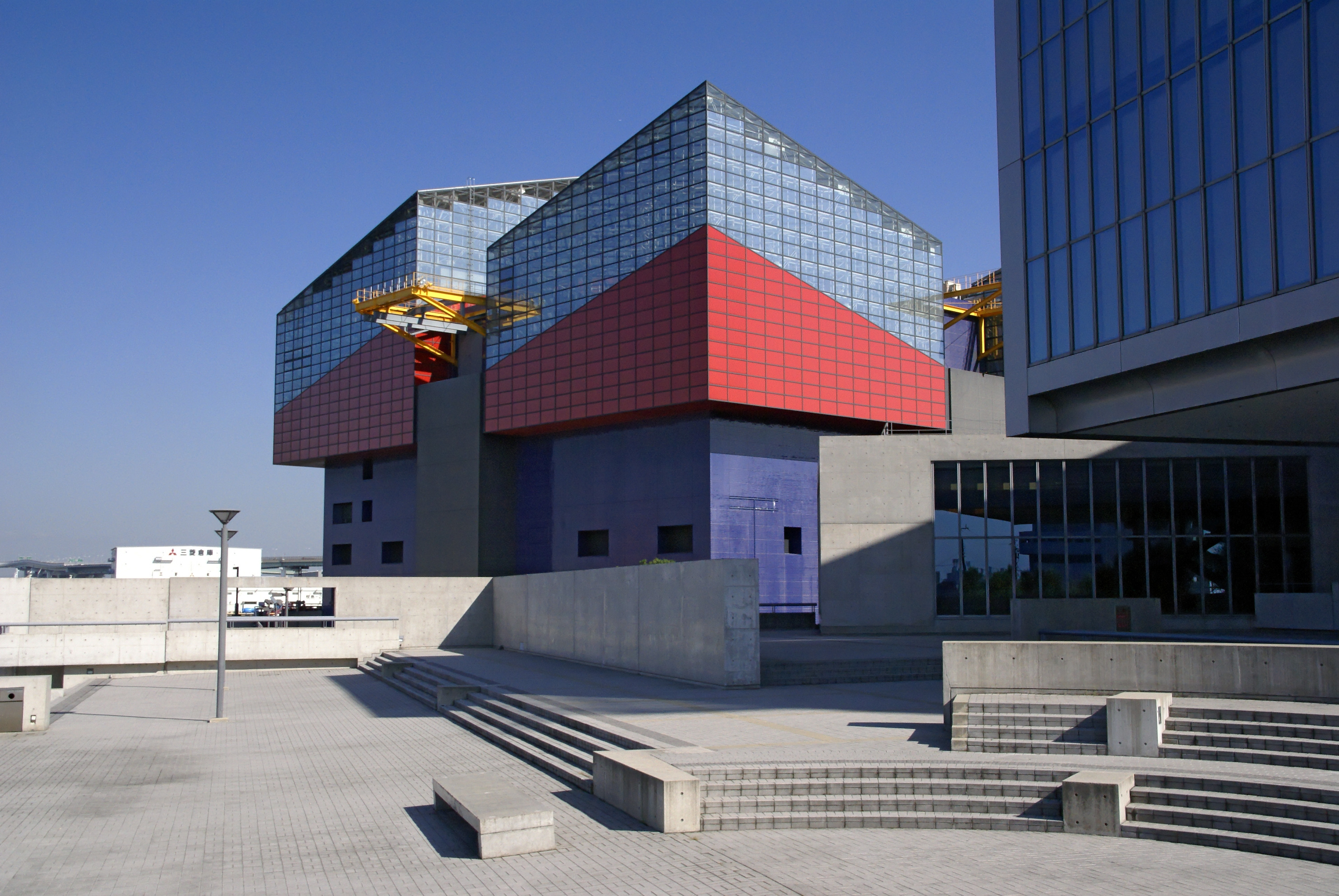 Osaka Aquarium KAIYUKAN (Ring of Fire Aquarium) in Osaka, Osaka prefecture, Japan